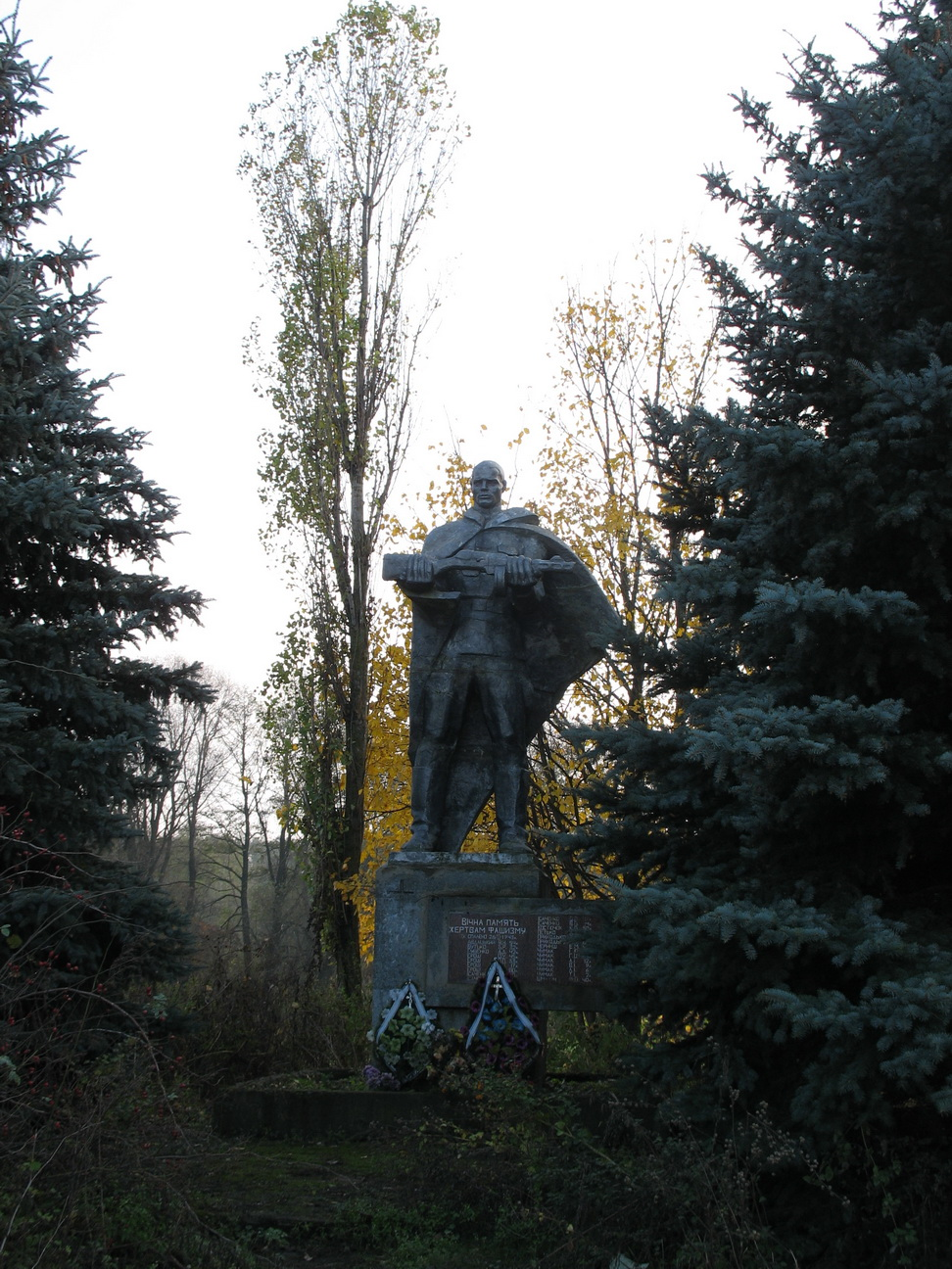 Україна, Чернігівська обл., Менський р-н, с. Киселівка. Меморіал жителям села, спаленим у хаті гітлерівцями в 1942 р. в рамках каральної операції через викриття партизанської бази біля Киселівки